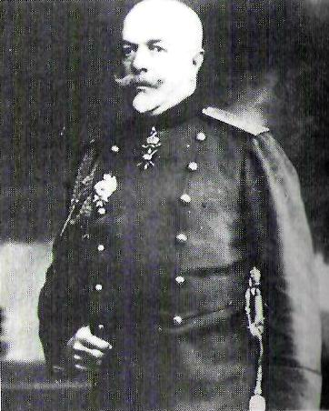 General Nikola Zhelyavski - Bulgarian officer, lieutenant general